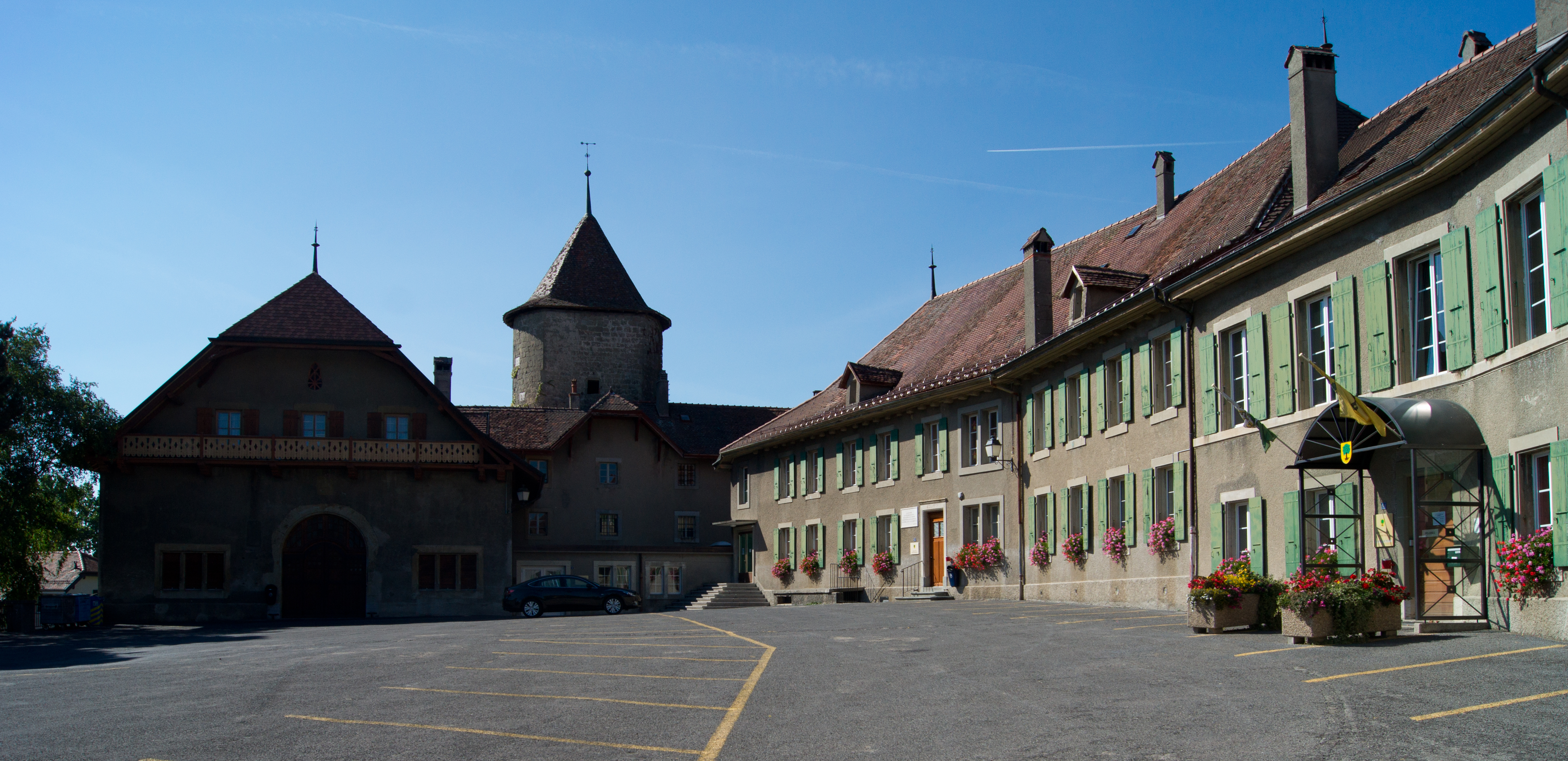 Château d'Echallens, canton de Vaud, Suisse.